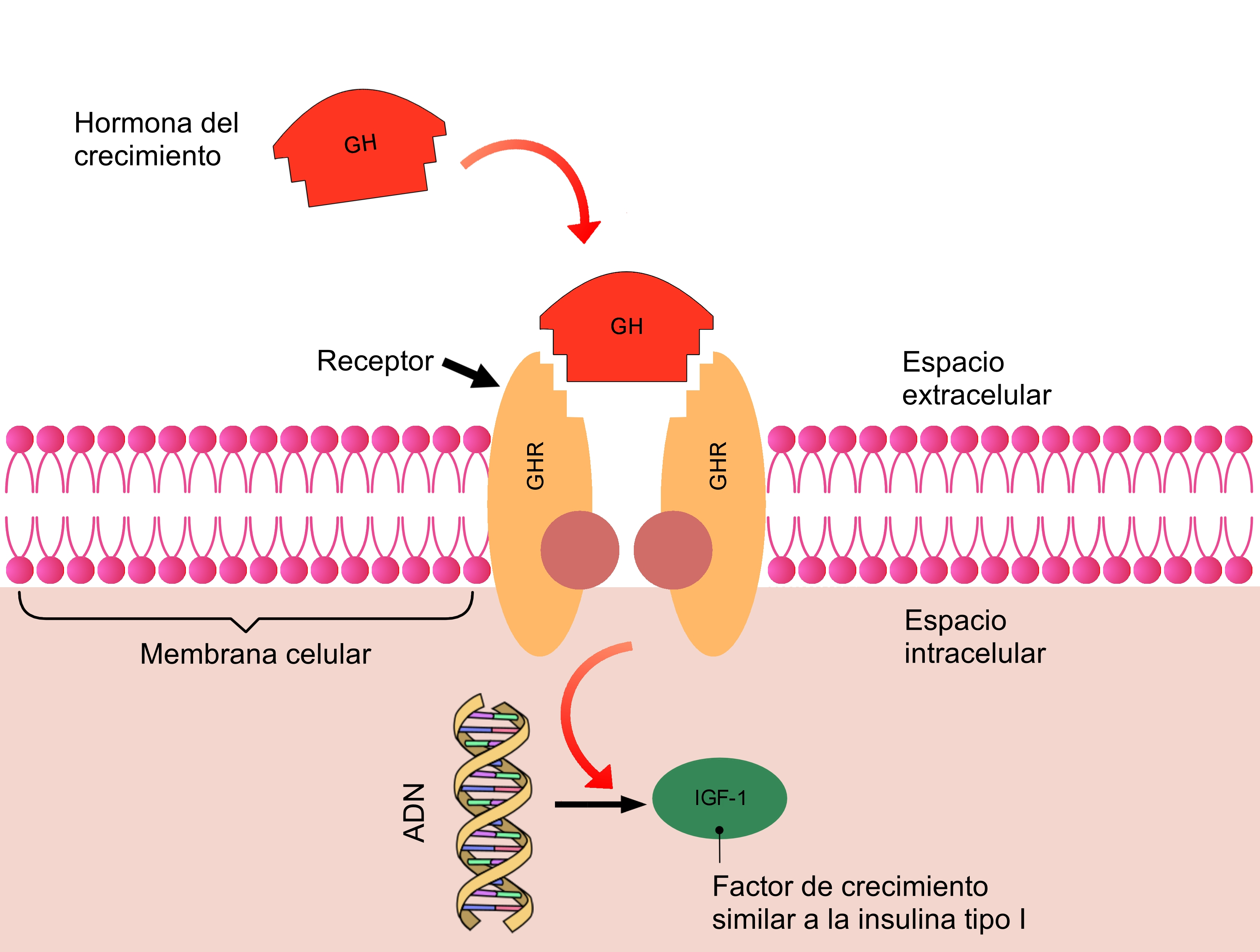 Esquema en el que se muestra la unión de la hormona del crecimiento al receptor celular y su efecto al estimular la síntesis de factor de crecimiento similar a la insulina I.